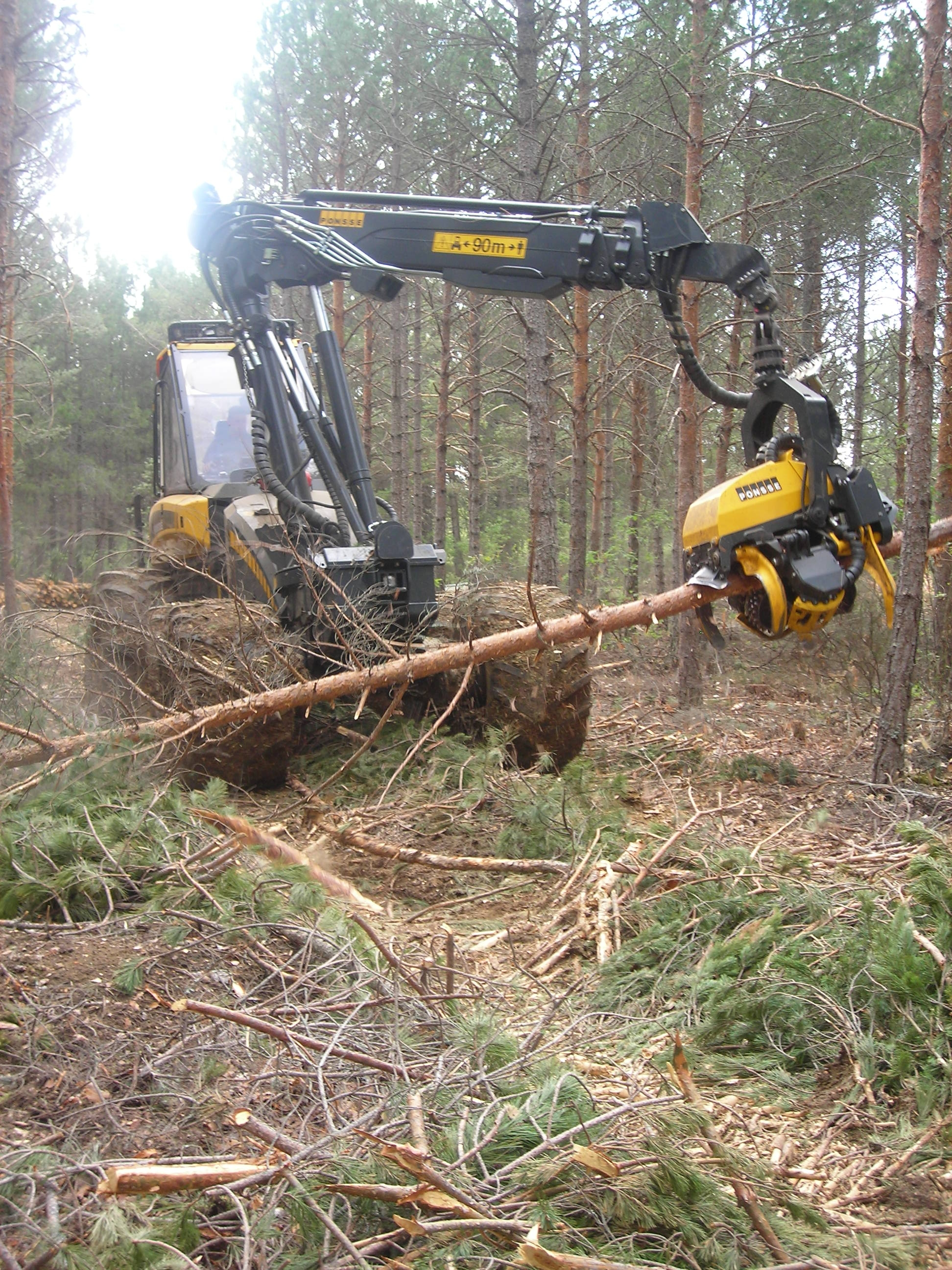 Procesadora Ponsse realizando trabajos de entresaca en el monte de Renedo (León).